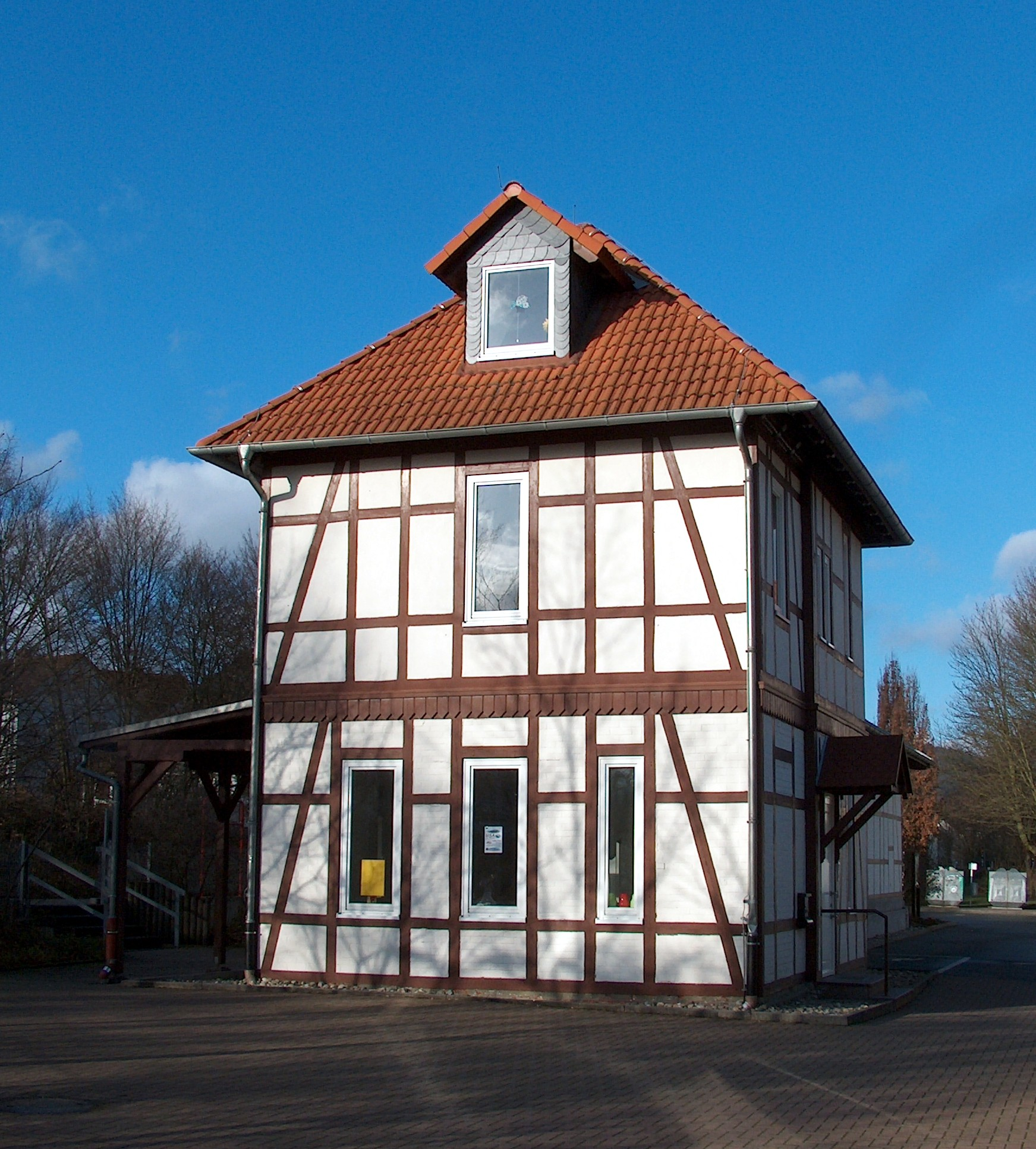 en.: formal railway station at Kelkheim-Münster; dt.: ehemaliger Bahnhof in Kelkheim-Münster, heute Kulturzentrum